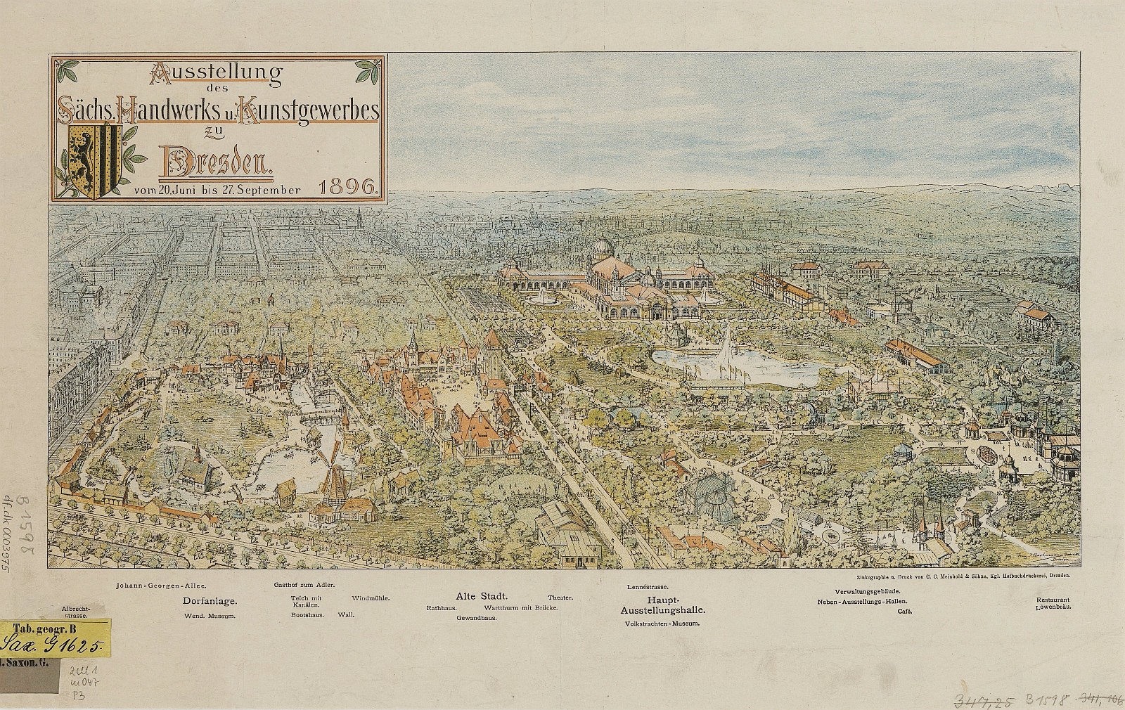 Die sächsische Ausstellung in Dresden, des Handwerks und Kunstgewerbes, 1896.